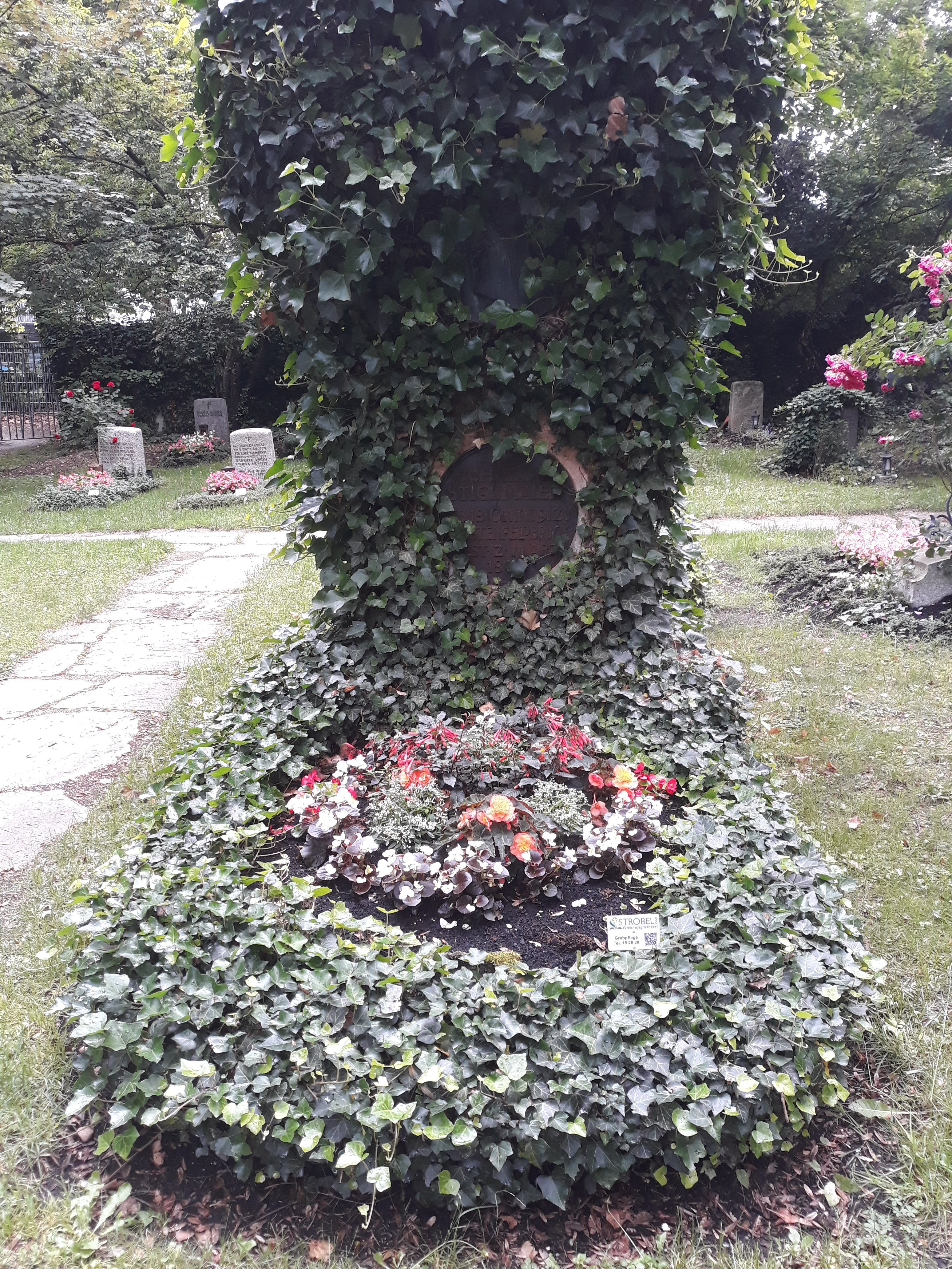 Das Familiengrab des deutschen Erzgießers Johann Baptist Stiglmaier auf dem Neuhauser Friedhof in München.